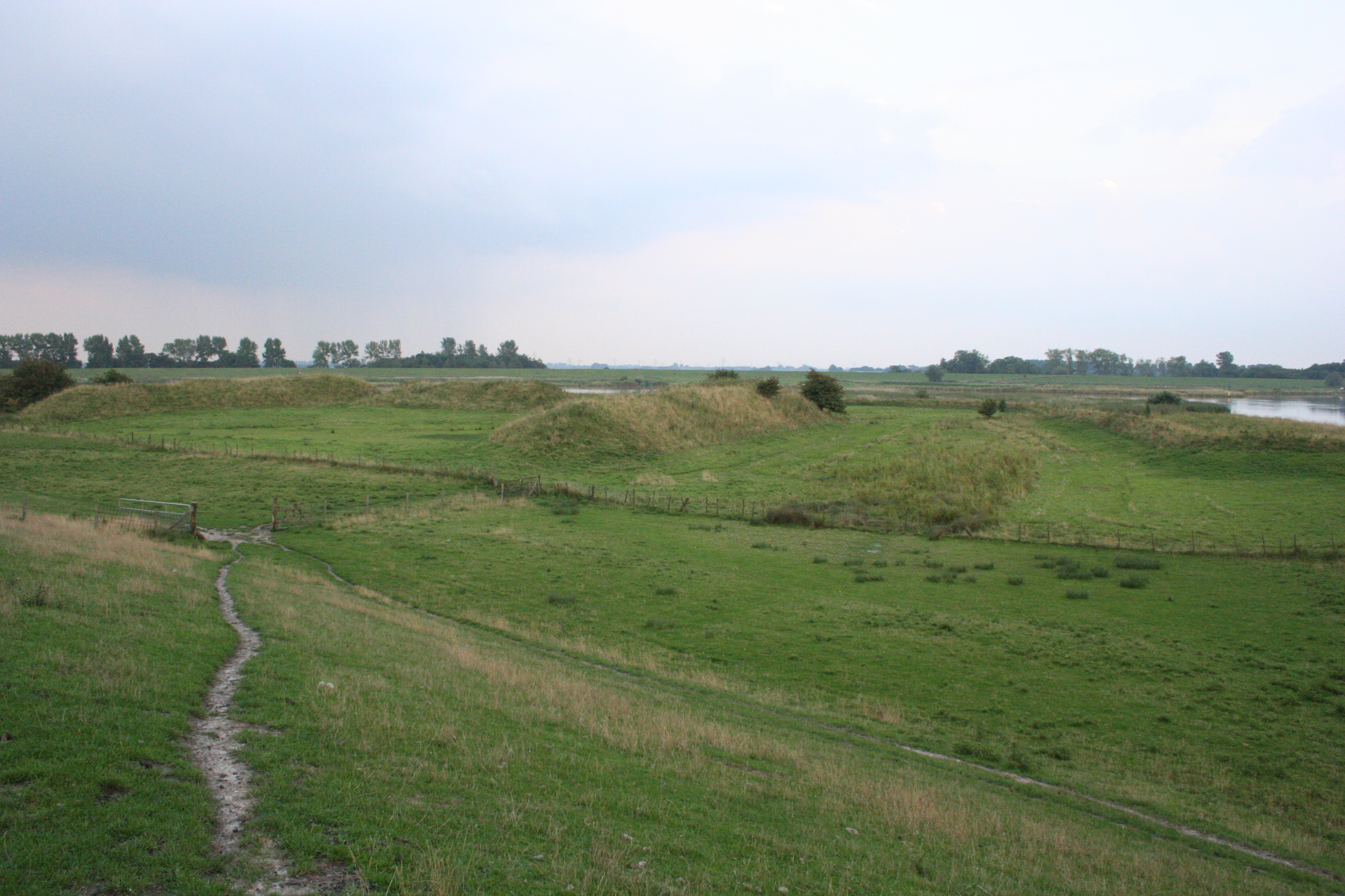 Die Überreste der Festung Leerort im Deichvorland am Zusammenfluss von Ems und Leda bei der Ortschaft Leerort, Stadt Leer (Ostfriesland).